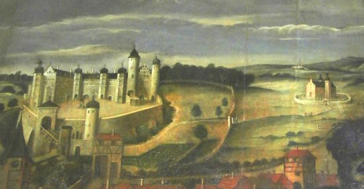 Das einstmals prächtige Renaissanceschloss von Büchold mit der Bruderschaftskapelle St. Nikolaus u. Mariä Heimsuchung. Die alte Pfarrkirche ist links unten in der Ecke.